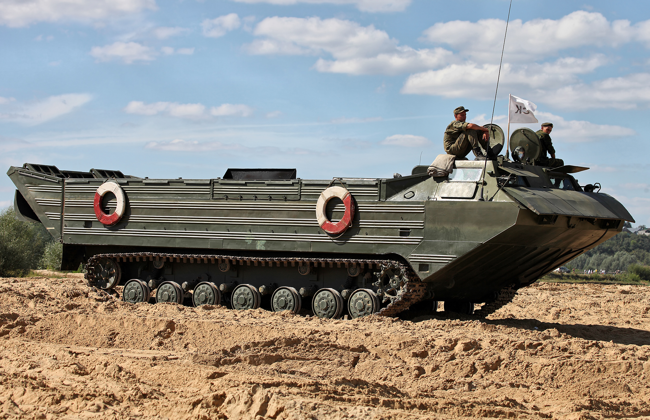 Плавающий транспортер ПТС-2 (PTS-2 amphibious carrier)